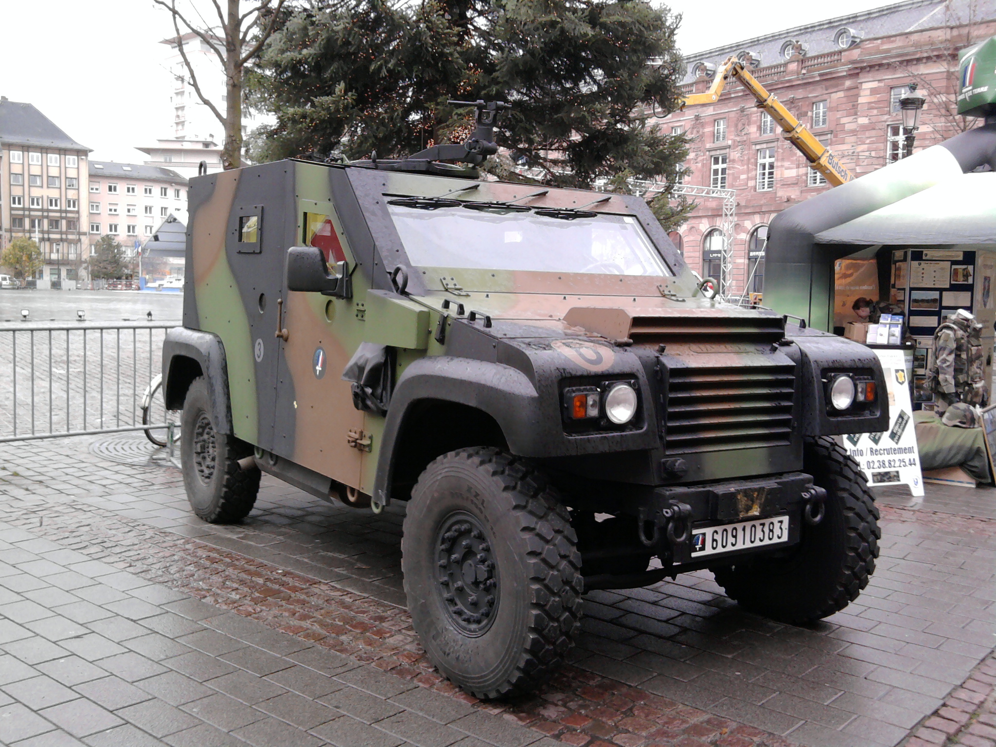 Petit Véhicule Protégé en présentation à Strasbourg, place Kléber